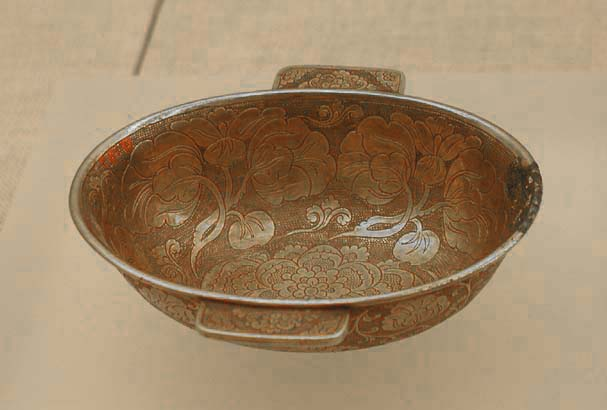 鎏金蔓草鸳鸯纹银zh:羽觞 本文物zh:1970年发现于zh:陕西zh:西安zh:何家村唐代窖藏，原藏于zh:陕西历史博物馆，藏品号七一124，高3.2厘米，长10.6厘米，宽7.5厘米。羽觞是zh:战国时期出现的器形，汉代以后逐渐消失。 zh:2004年7月展出于zh:北京大学zh:赛克勒考古与艺术博物馆，User:Mountainzh:2004年zh:7月28日拍摄。拍摄者已授权依照GFDL协议发布该图像。